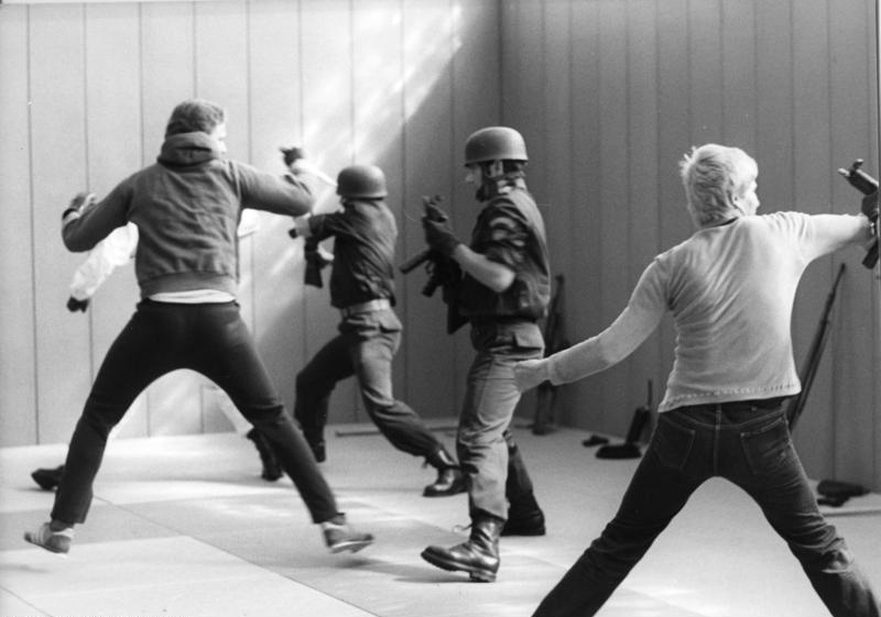 Bundeskanzler Schmidt besichtigt GSG 9 in Hangelar Angehörige der Sondereinheit des Bundesgrenzschutzes - GSG 9 - bei der Ausbildung.